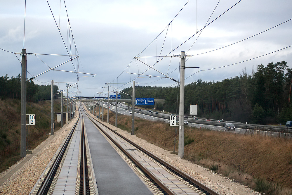 Parallel velaufende NBS Ingolstadt–Nürnberg und Bundesautobahn 9.